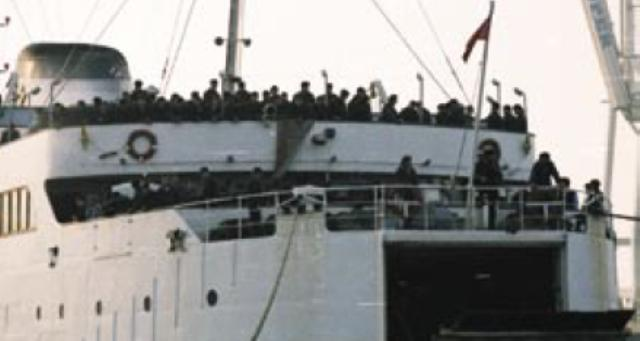 Odhod zadnjih vojakov JLA iz Kopra.